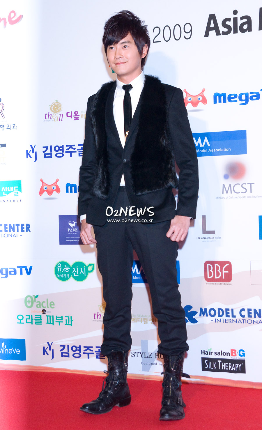 2009 아시아모델 페스티벌 어워즈